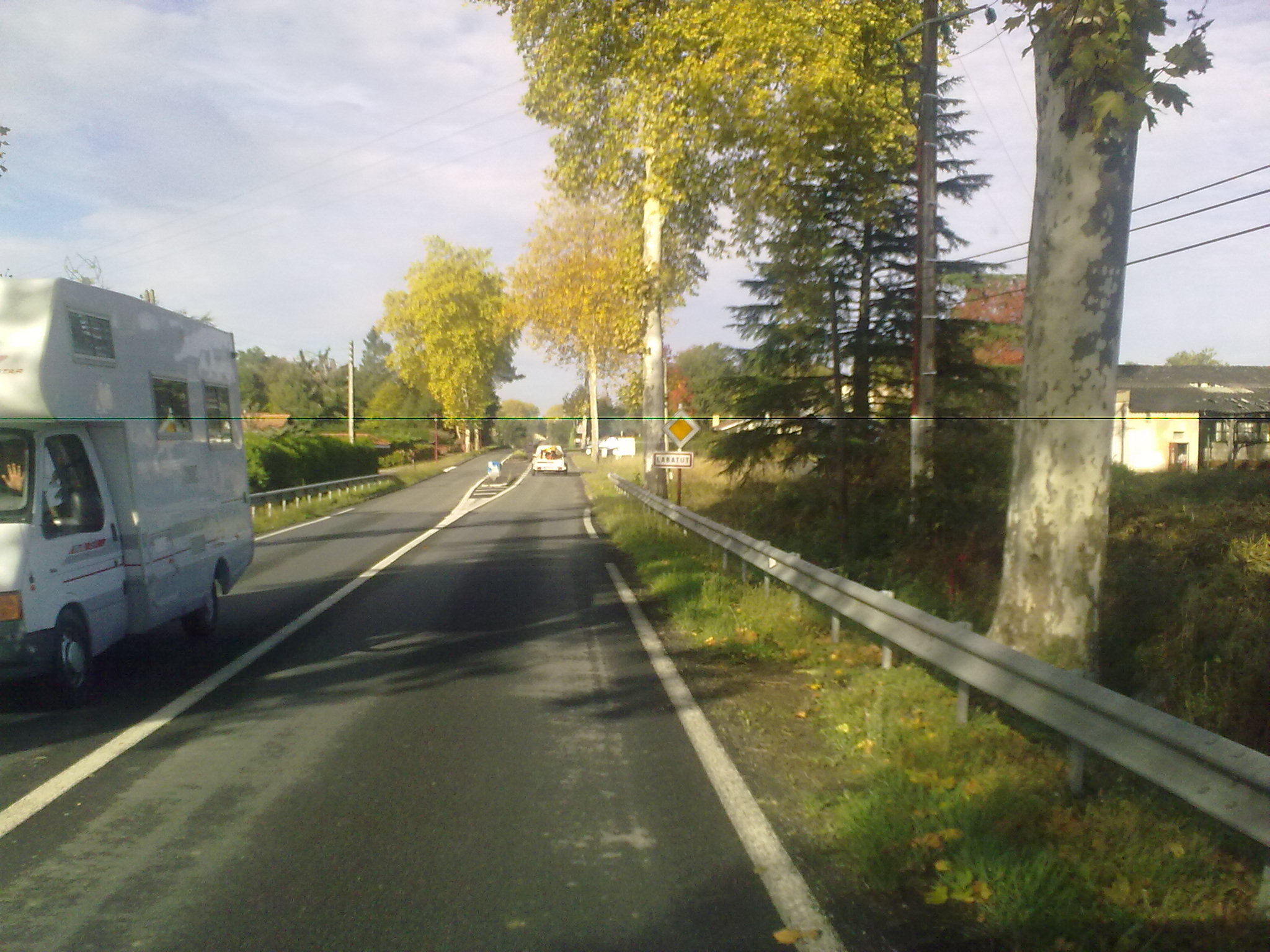 Entrée dans Labatut (Landes)